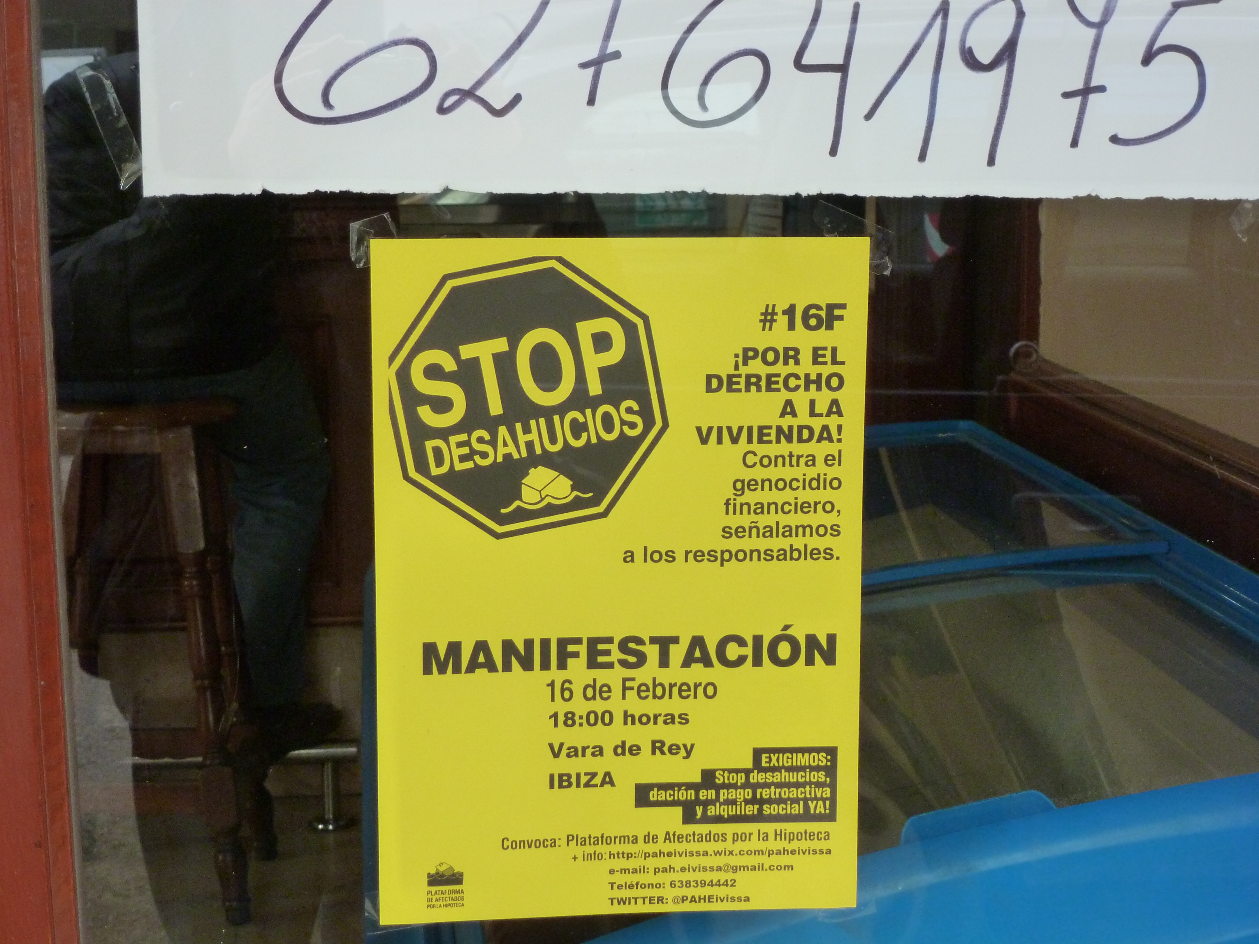 Protestaufruf gegen Zwangsräumungen in Ibiza, Spanien.